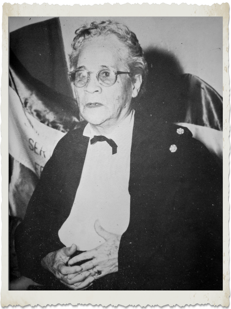 Fotografía de la escritora, periodista, profesora María Trinidad del Cid.